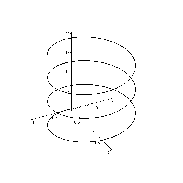 Helice